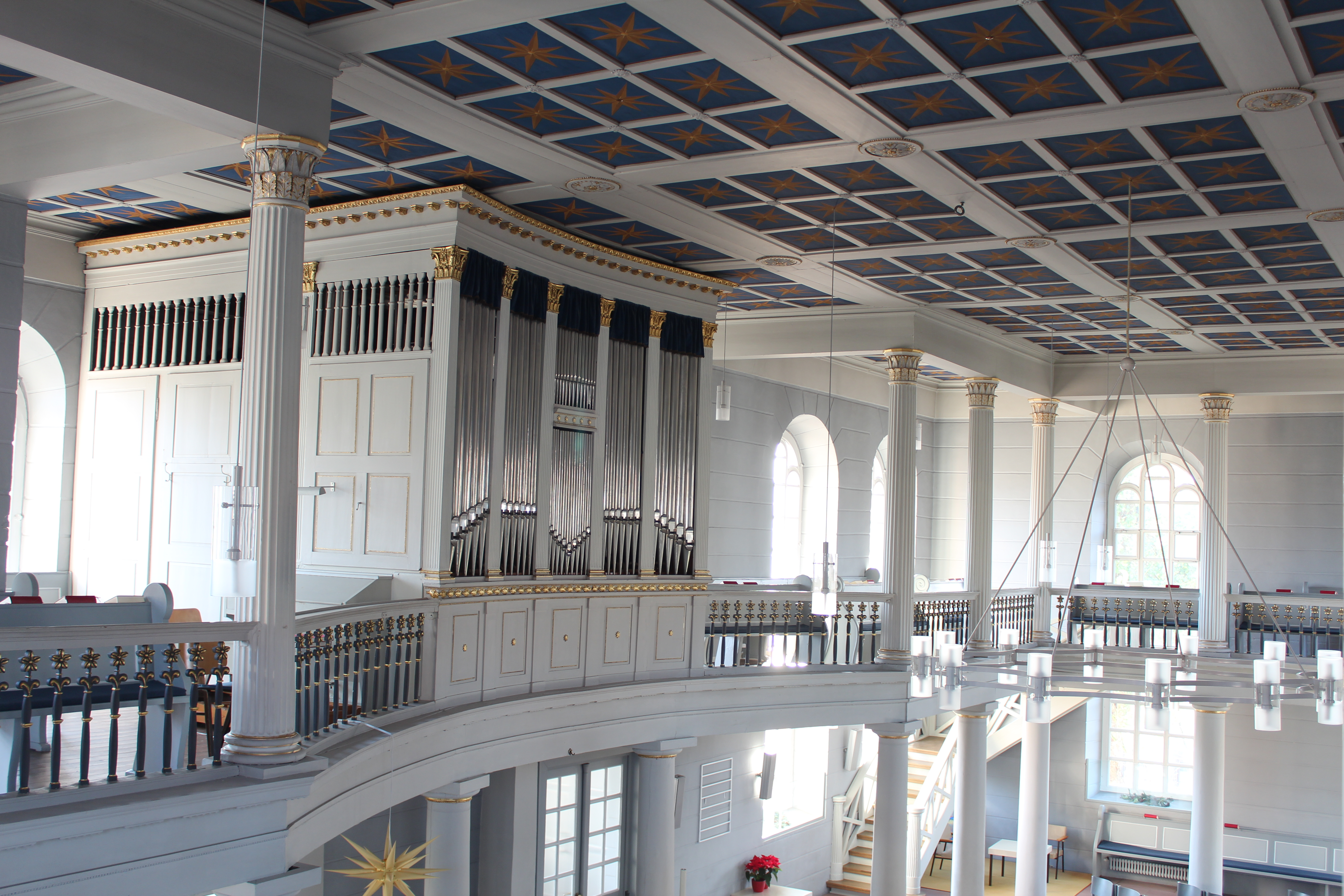 Orgel der Evangelischen Kirche Wißmar, Gemeinde Wettenberg, Landkreis Gießen, Hessen, Deutschland